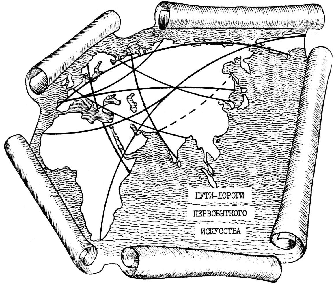 Схема "Пути первобытного искусства в палеолите". Источник: Баньковский Л. В. Статьи. Очерки. Документы. 1995—1997 // Собрание сочинений. — Березники: РГБ, 2013. — Т. 9. — С. 1581.